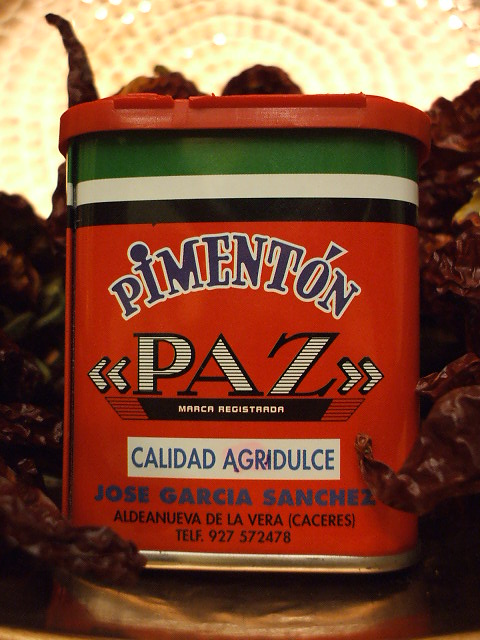 Papriko de La Vera.